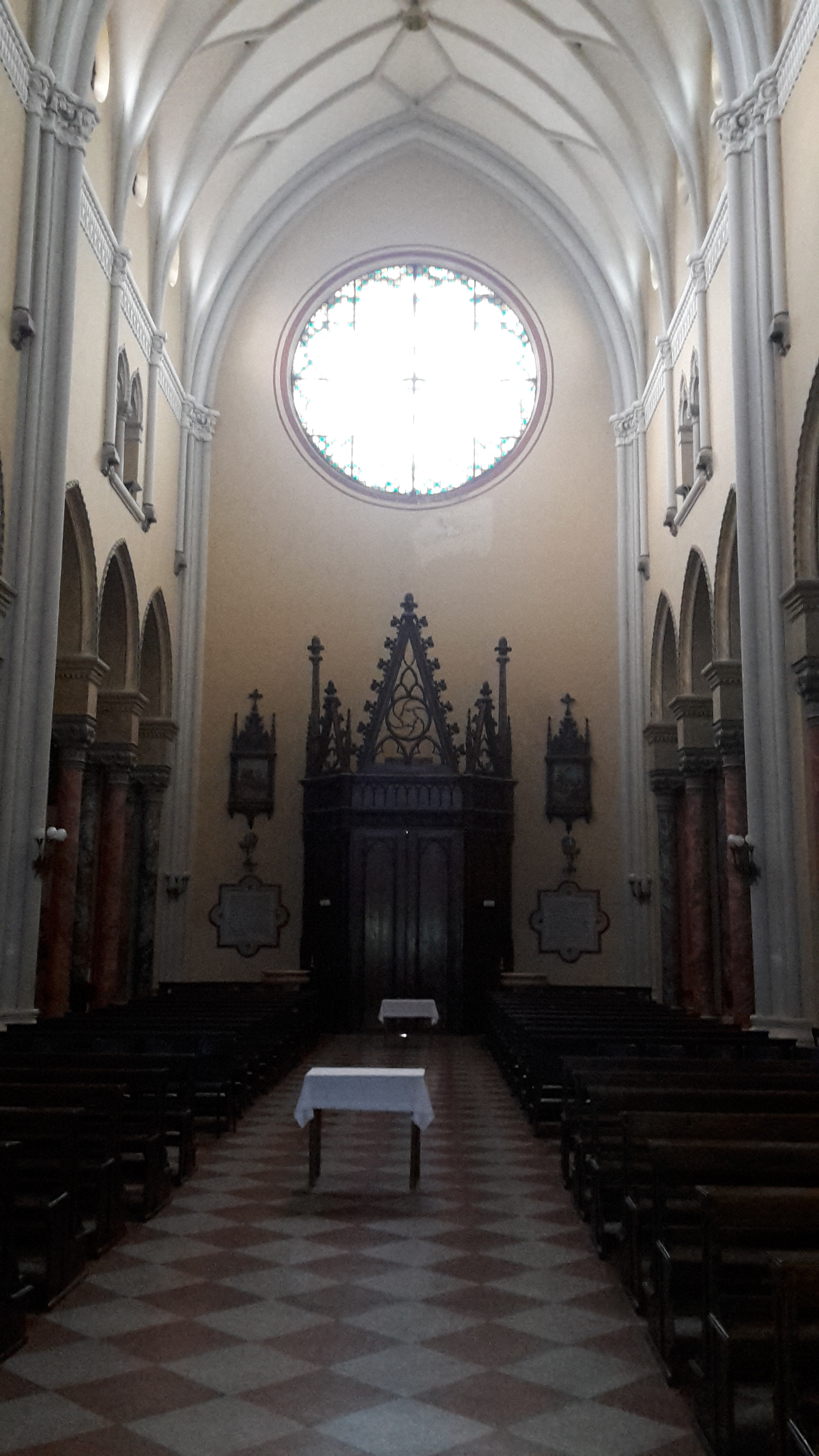 La navata centrale con il grande rosone e l'imponente bussola di ingresso